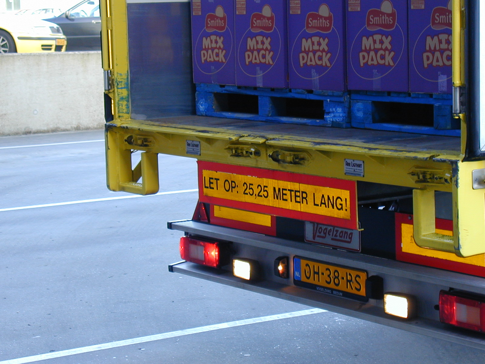 Heckansicht eines 25,25 m langen EuroCombi-Zuges in den Niederlanden